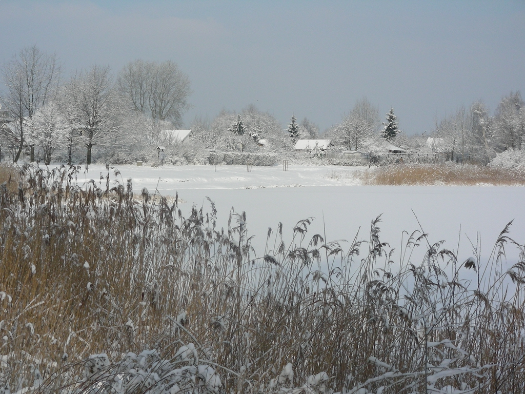 lake Glinianki in Zielonka in winter